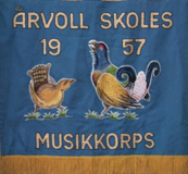 Nåværende fane til Årvoll Skoles Musikkorps